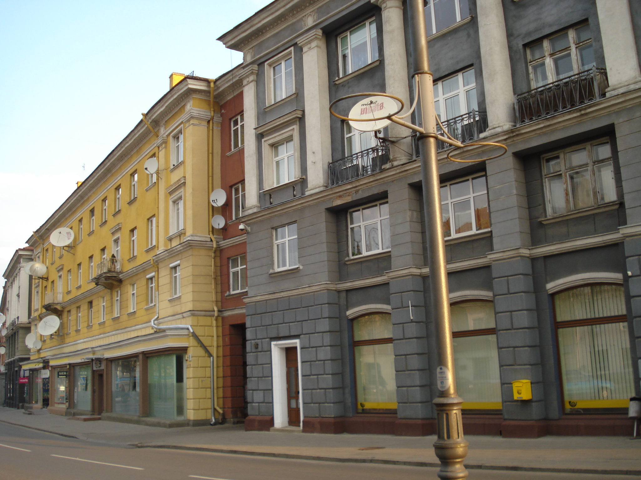 House in Vokiečių street in Vilnius (Vokiečių g. 5, 7). Built after WWII by Viktor Anikin